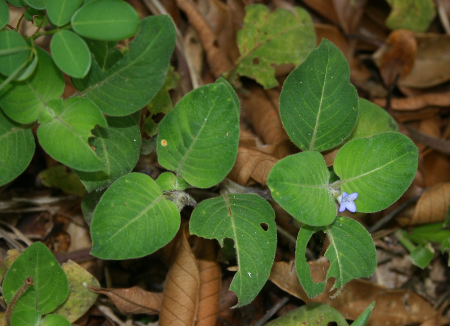 Coccocypselum hirsutum, Kaffeegewächse (Rubiaceae) - Costa Rica: Prov. Puntarenas, La Gamba NW Golfito, "Fila Trail" NW "Tropenstation La Gamba"/"Estación Biológica La Gamba"